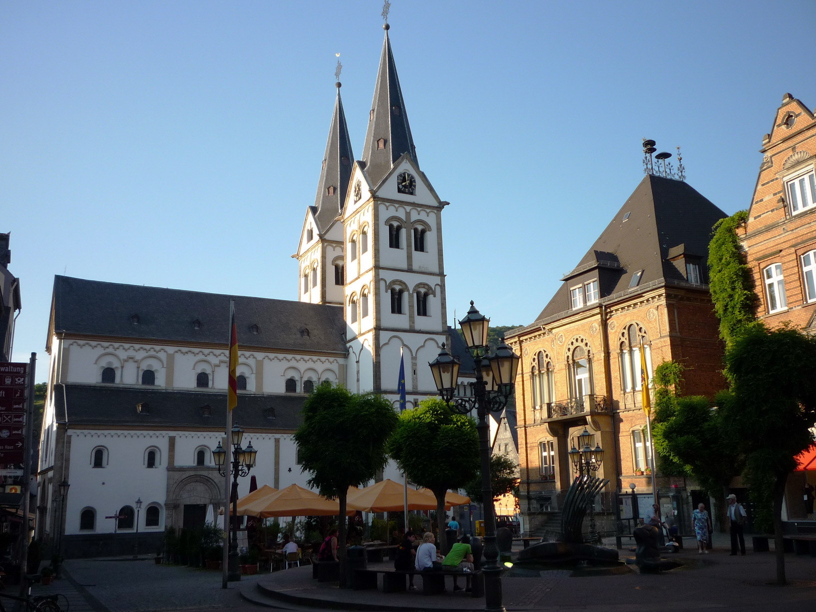 Marktplatz von Boppard mit der St.-Severus-Kirche und dem alten Rathaus